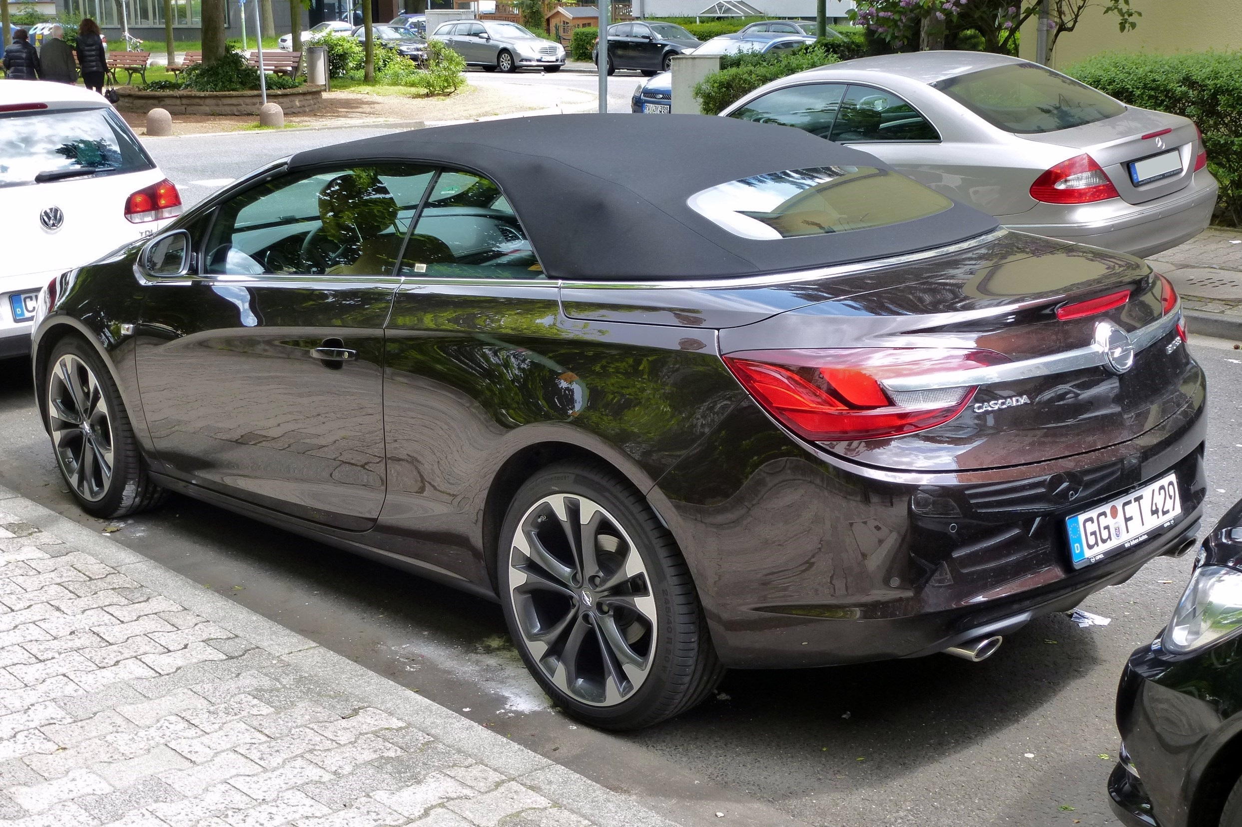 Opel Cascada